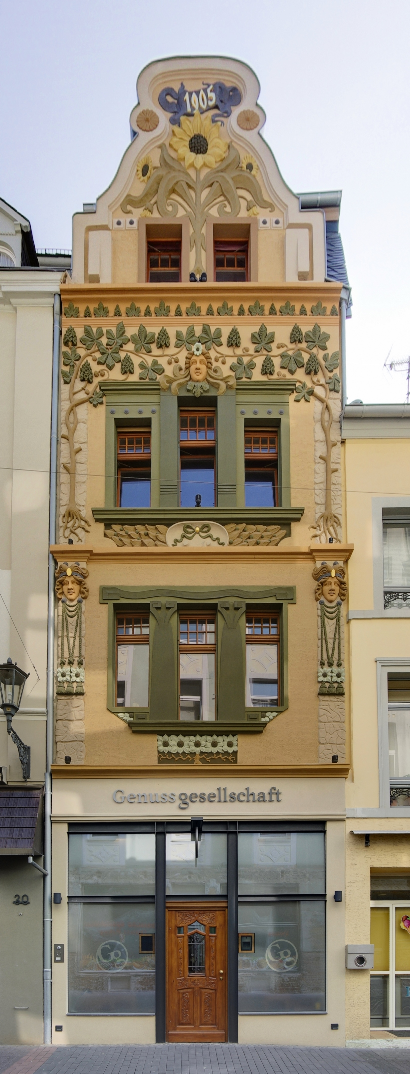 Trier, Nagelstraße 31, "Genussgesellschaft": dreigeschossiges Zeilenwohn- und Geschäftshaus mit Jugendstil-Stuckfassade, bezeichnet 1905, Architekt H. Meppert; älterer tonnengewölbter Keller